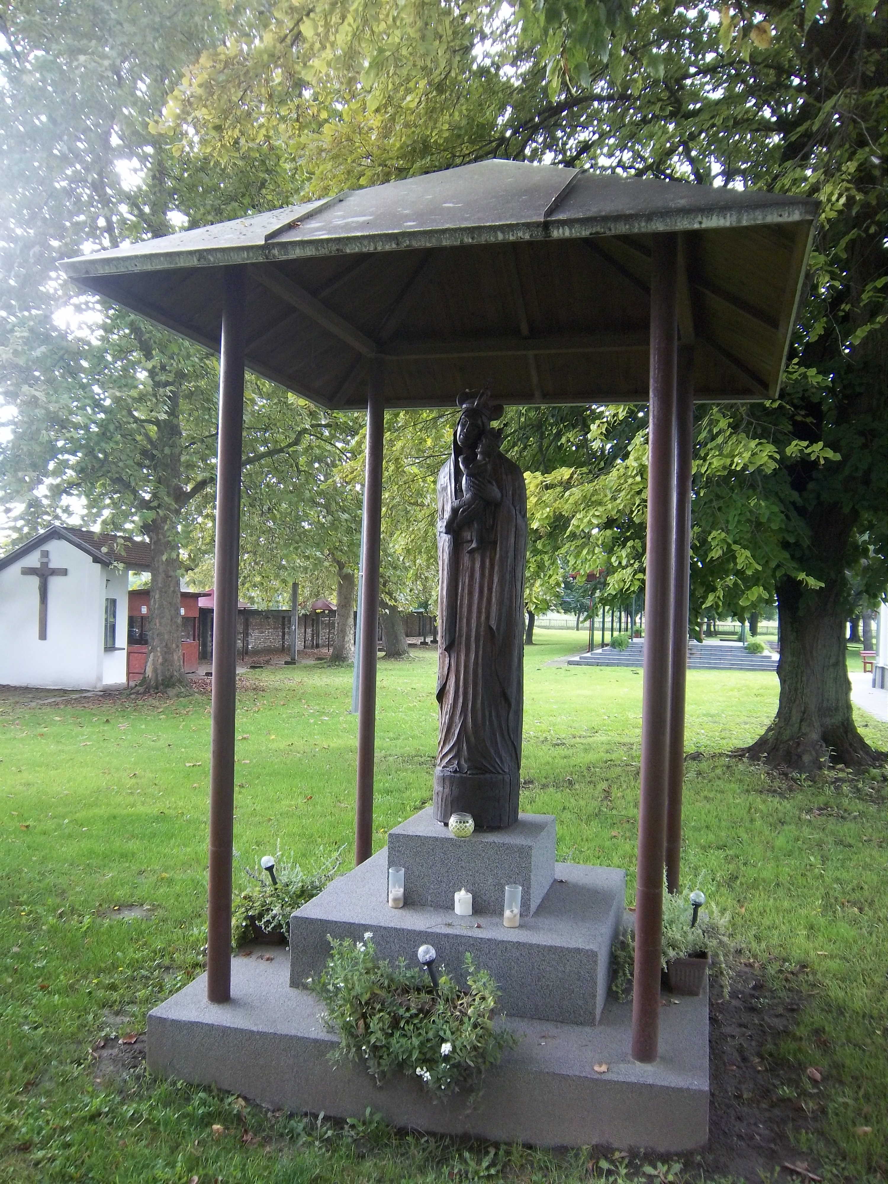 Српски (ћирилица): Светиште Госпе илачке (Република Хрватска)